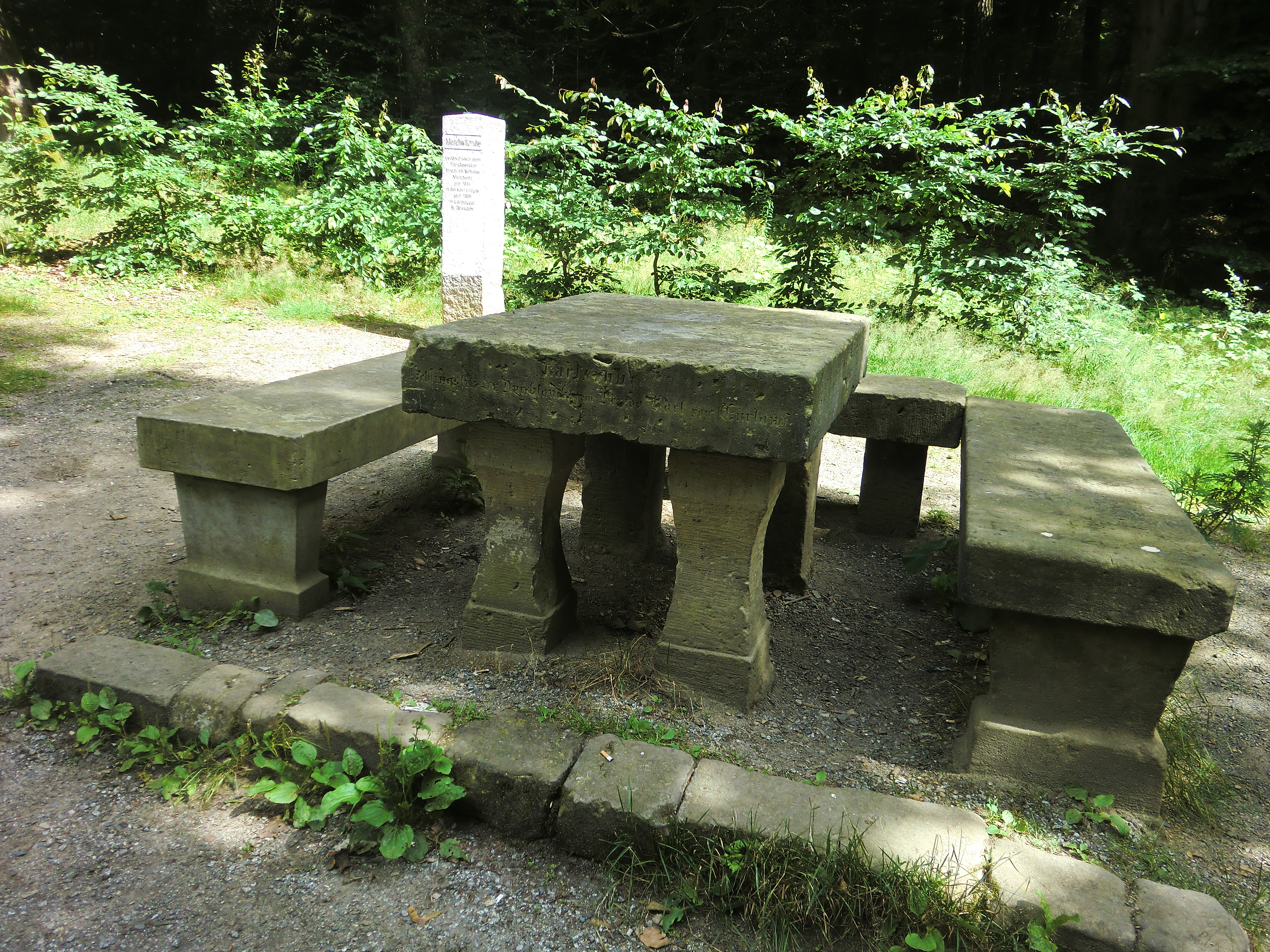 Dresdner Heide-Meschwitzruhe 2016